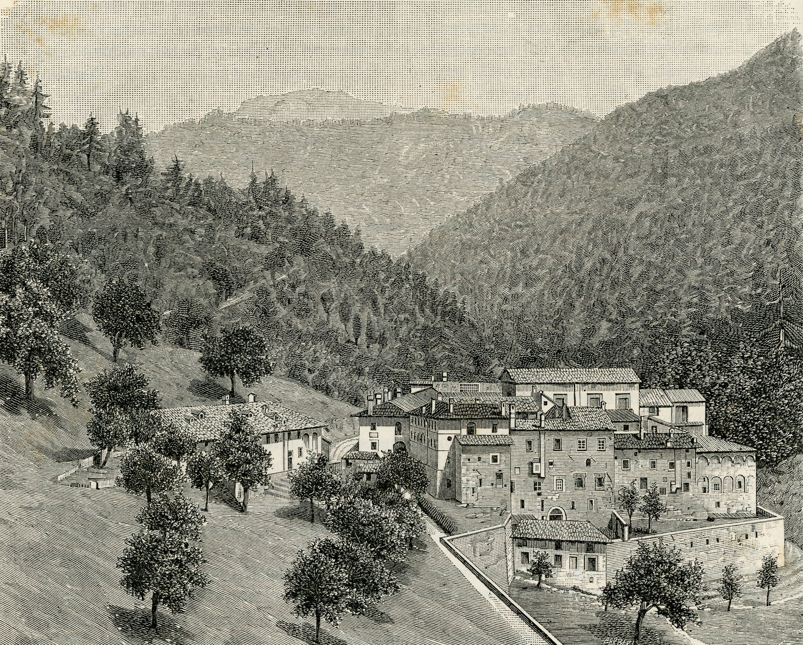 Panorama del Convento di Camaldoli (xilografia di Giuseppe Barberis).